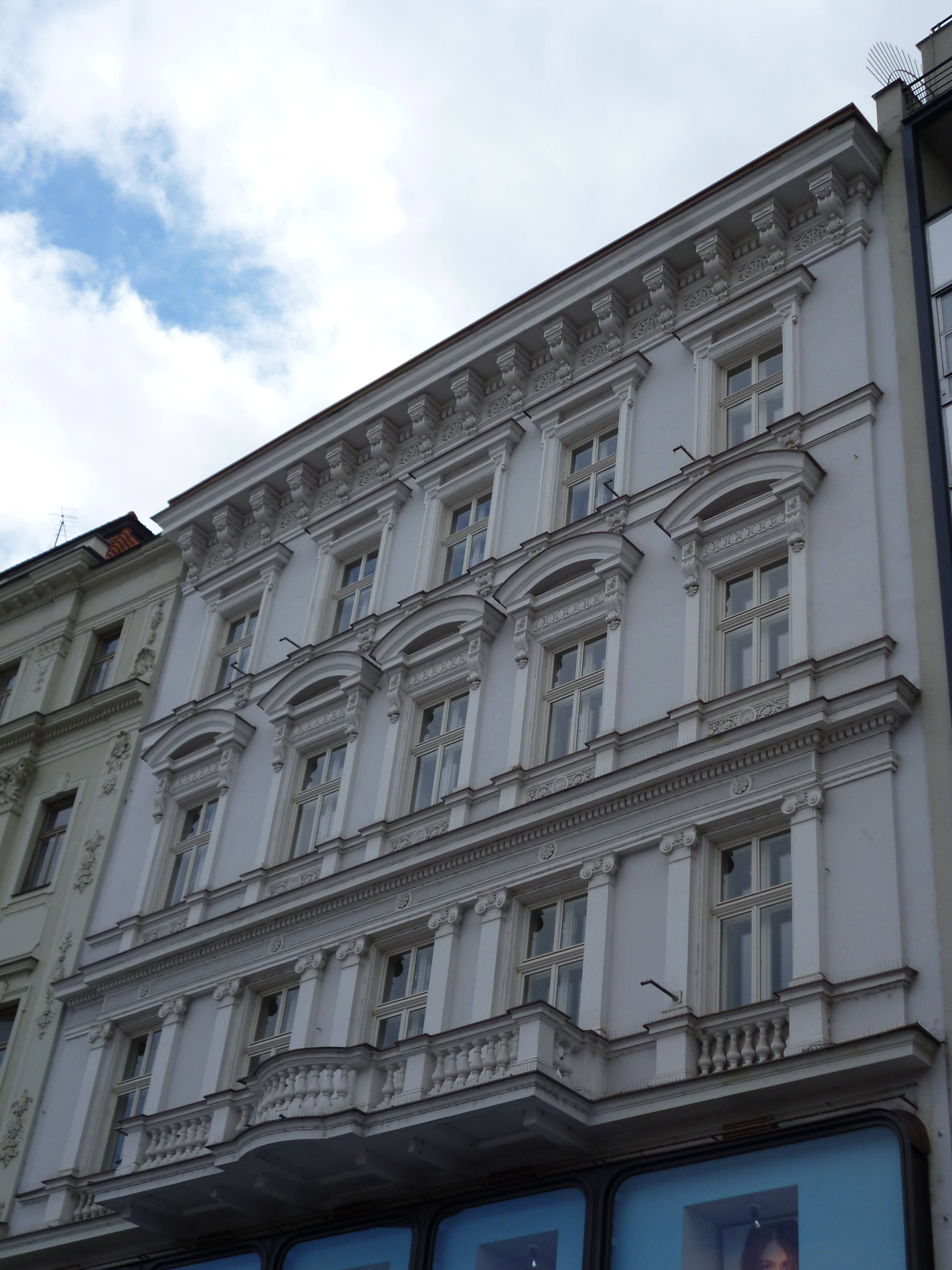 Činžovní dům (Brno), Brno - město, nám. Svobody 91/20, Brno